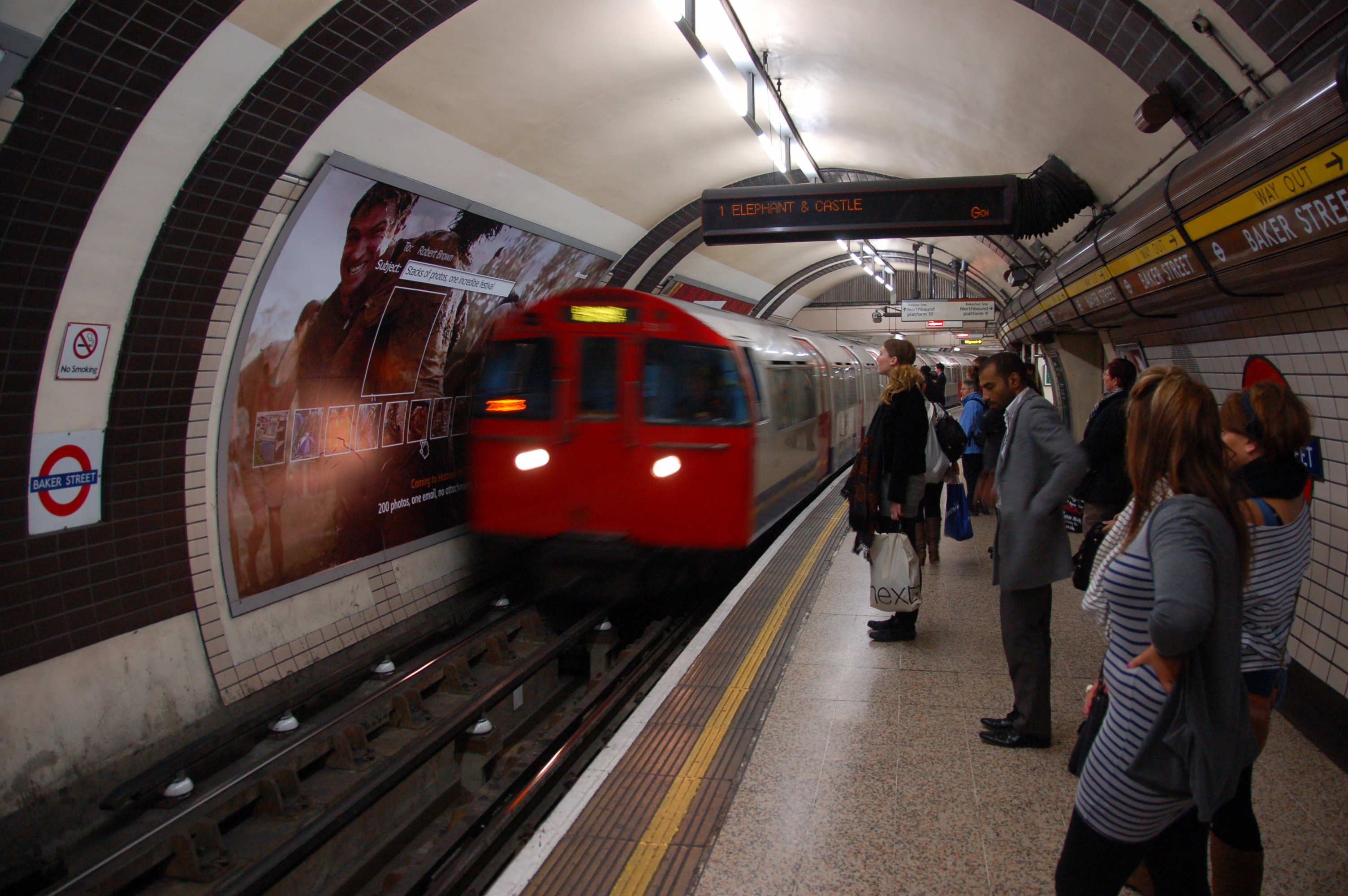 London